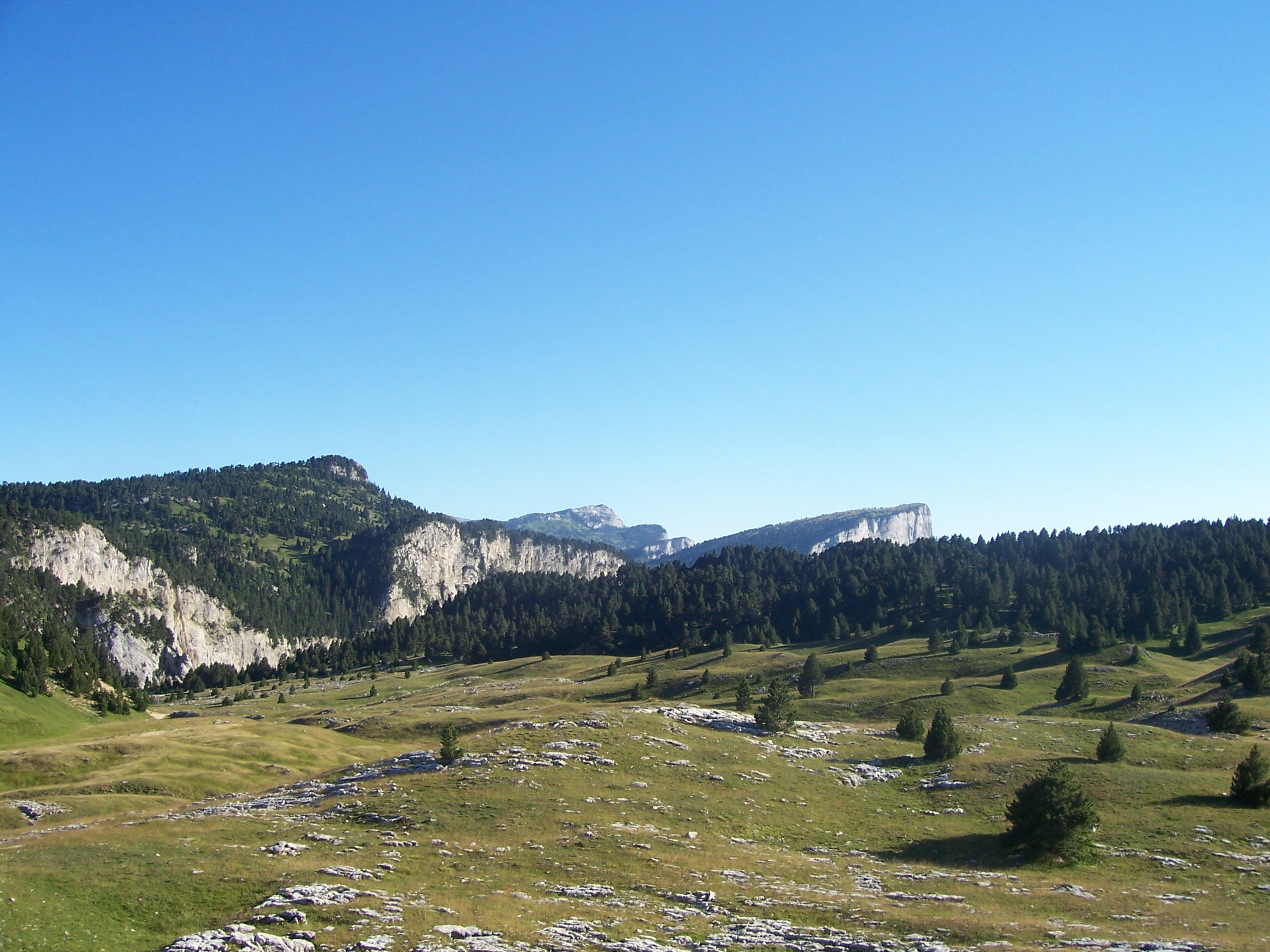 Hauts Plateaux du Vercors - A proximité de la cabane de Pré Peyret